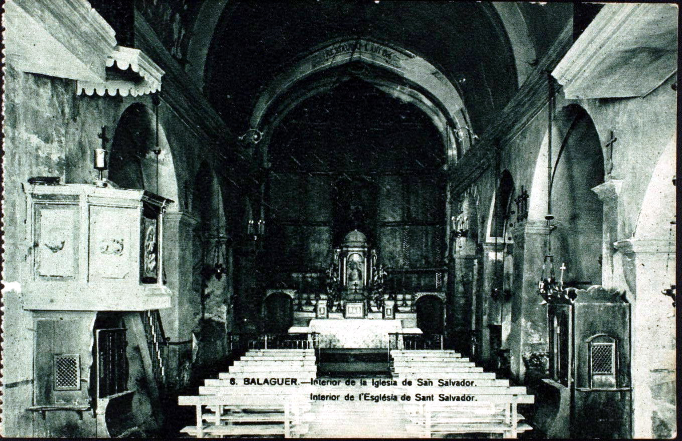 Postal-recordatori de Balaguer que mostra l'interior de l'església de Sant Salvador anys abans de ser derruïda. Darrera l'altar i en penombra, el retaule del Mestre de Balaguer